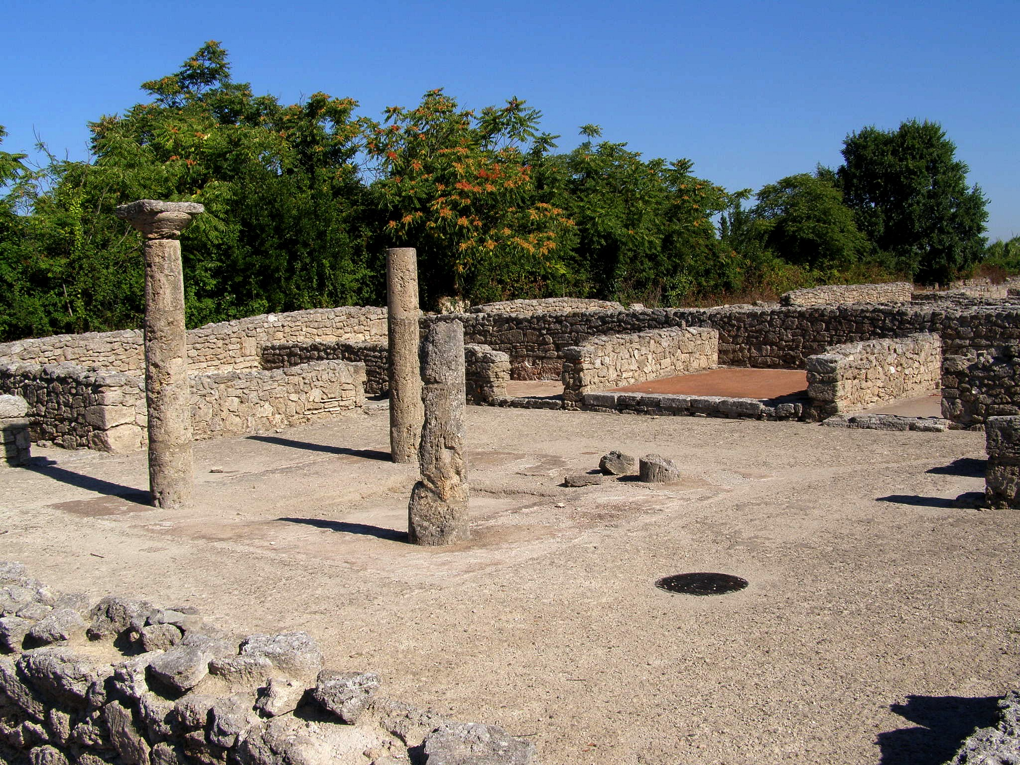 Zvyšky obytnej stavby